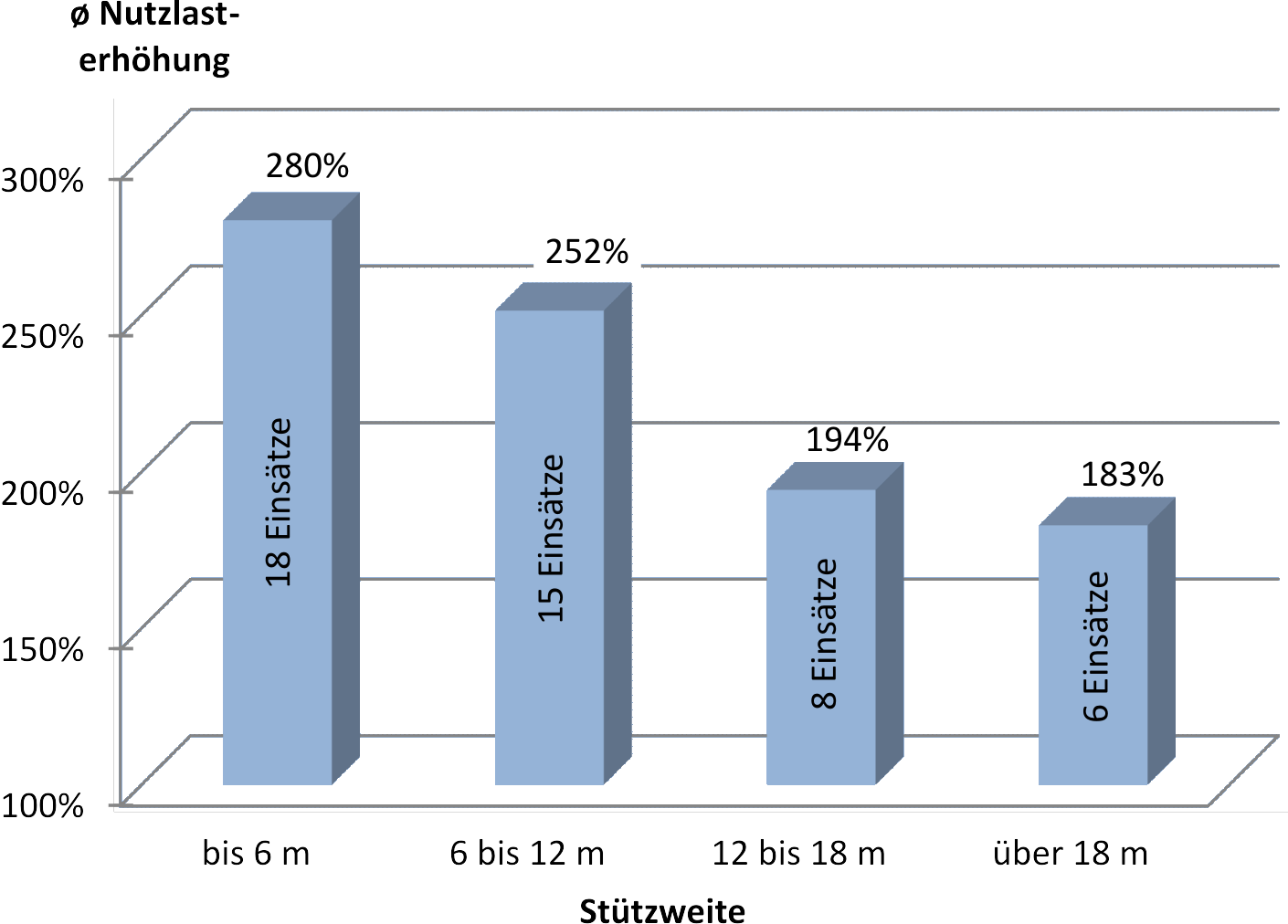 Statistik: Nutzlasterhöhung bei Belastungsversuchen an Straßenbrücken